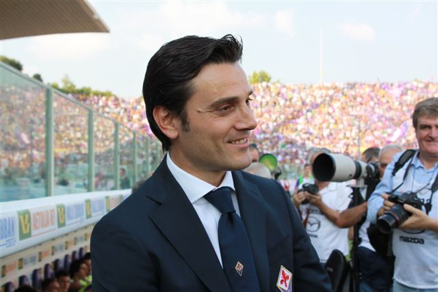 Il nuovo allenatore della Fiorentina, Montella.